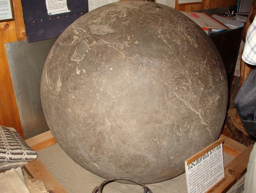 Космичка кугла из Кремана на Златибору, Србија